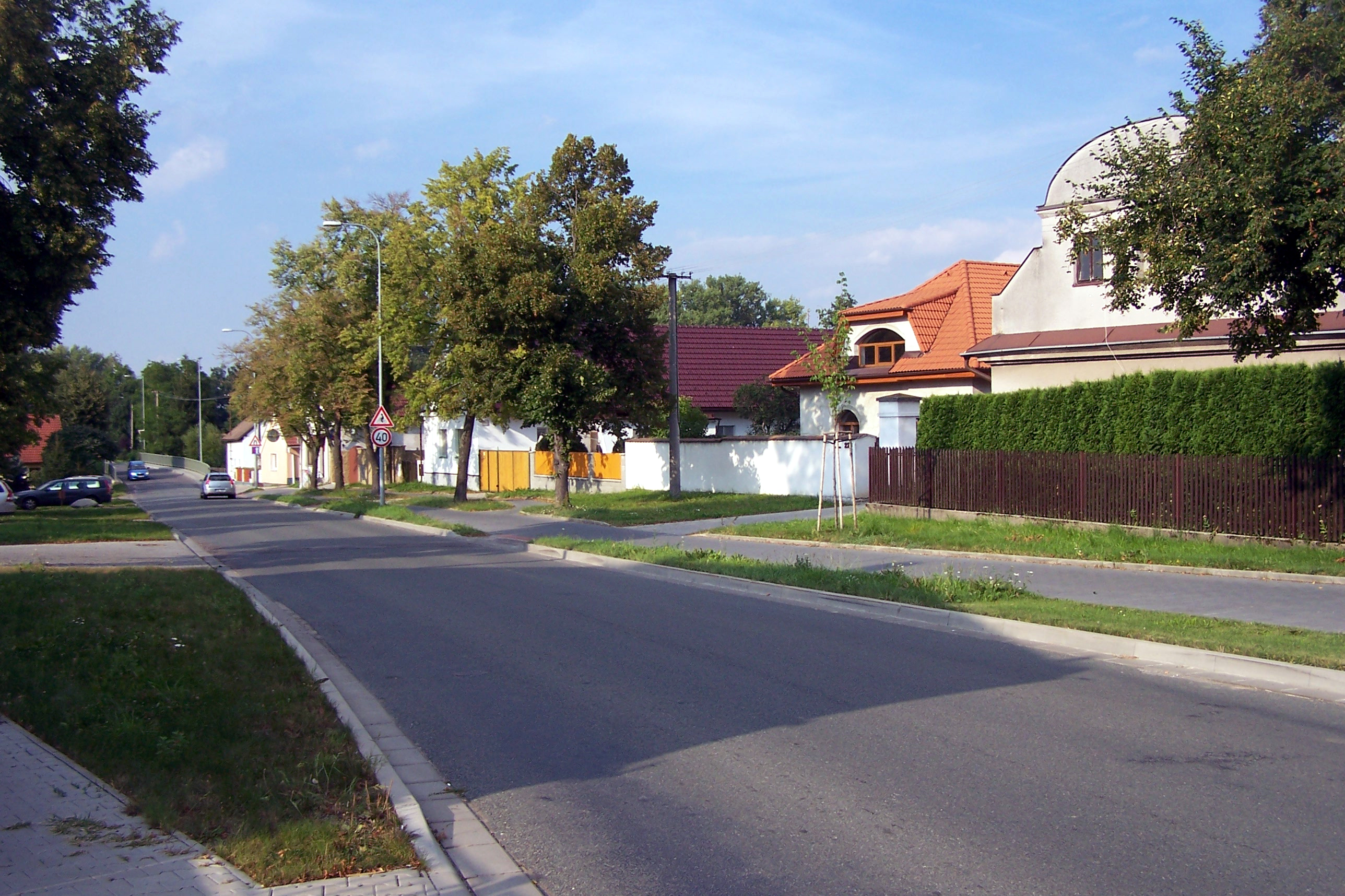 Nemošice, pohled na staré náměstí. GPS: 50°0'45.750"N, 15°47'44.613"E